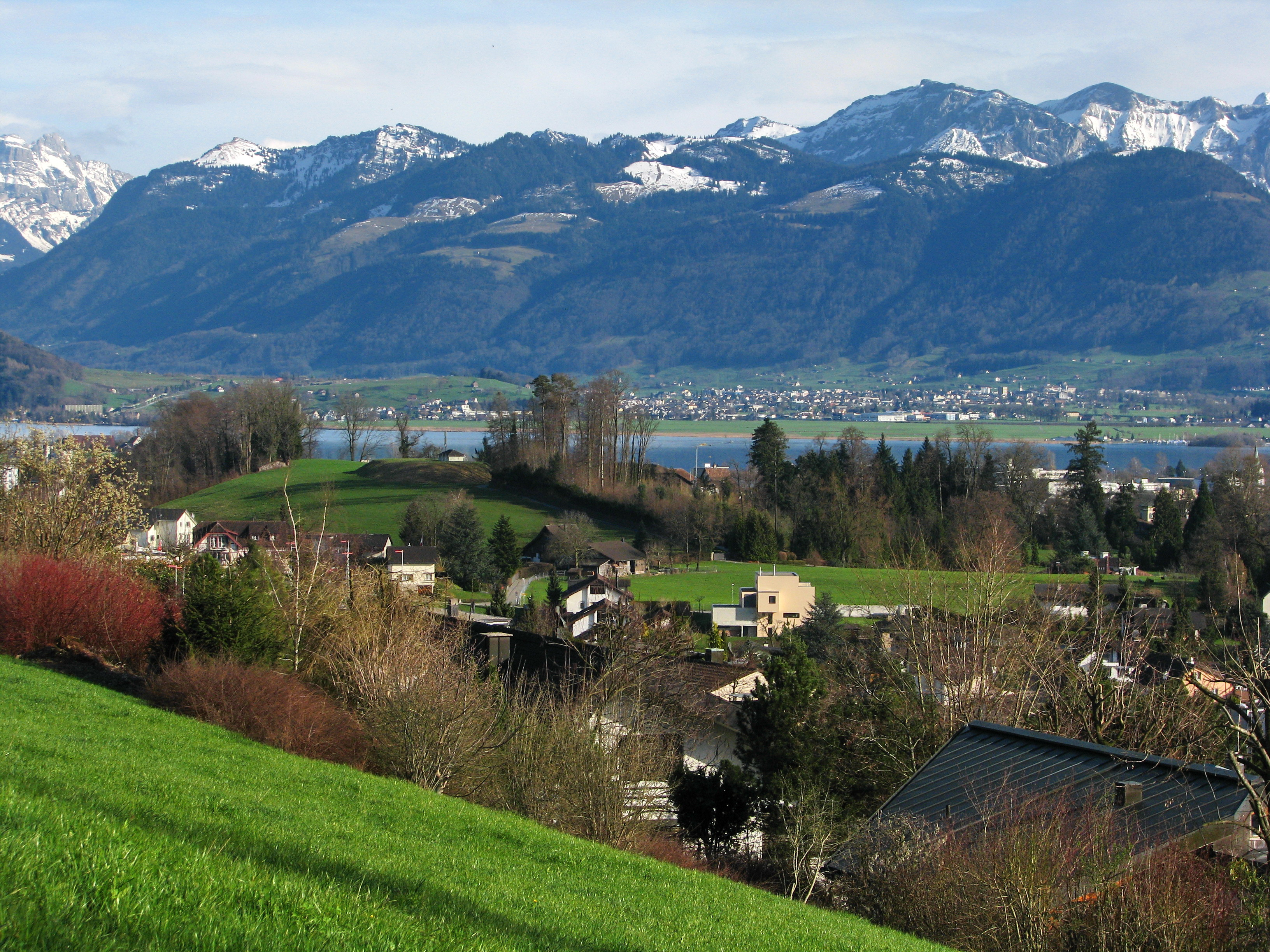 Meienberg in Rapperswil-Jona (Switzerland), as seen from Frohberg in Kempraten-Lenggis, Obersee (upper Lake Zürich) and Lachen (SZ) and Buechberg (to the left) in the background.